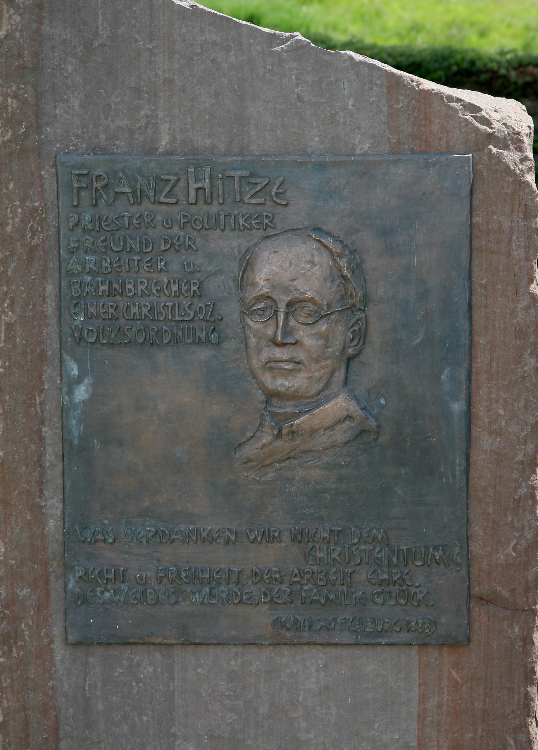 Gedenktafel an der Grabstätte des Franz Hitze in Olpe-Rhode.